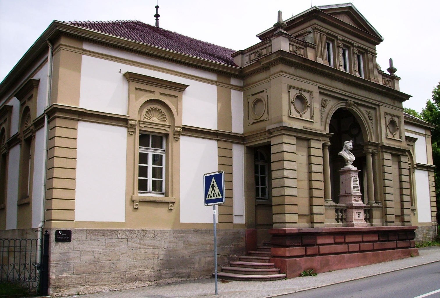 Fürstin-Eugenie-Kindergarten (Hechingen)